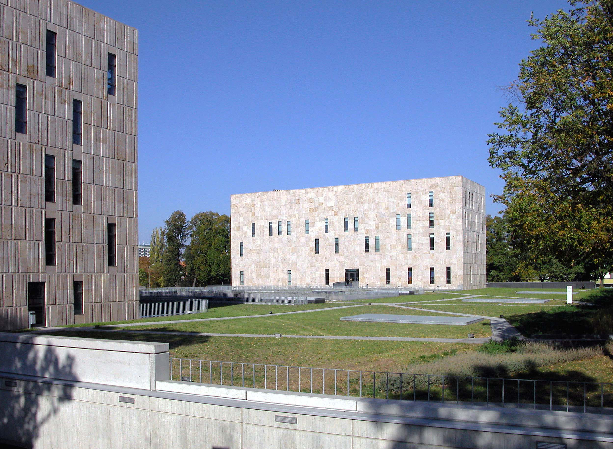 18.10.2003 Dresden-Südvorstadt, TU Dresden, Zellescher Weg 18 (GMP: 51.028253,13.736781): Sächsische Landes- und Universitätsbibliothek (SLUB). Erbaut von 1999 - 2003 nach Plänen von Ortner & Ortner, Projektleitung ATP Achammer-Tritthart & Partner. Sicht von Südosten. [-]20031018500DR(c)Blobelt